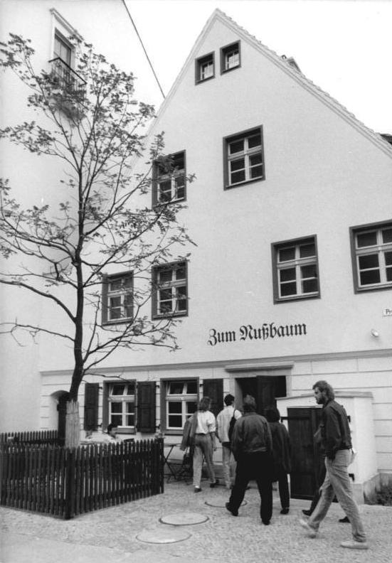 Berlin, Gasthaus "Zum Nußbaum" ADN-ZB Oberst 10.10.87 Berlin: "Zum Nußbaum"- Im Niokolaiviertel öffnete die ursprünglich auf der Fischerinsel gelegene und jetzt wiedererrichtete historische Gaststätte "Zum Nußbaum" ihre Pforten. Das kleine Lokal wurde berühmt durch seine einstigen Stammgäste wie Heinrich Zille und Otto Nagel, die das Haus vielfach im Bild festhielten. Heute bietet das "Kneipen"-Interieur in drei Räumen 32 Personen Platz. Das Wahrzeichen - ein Schwarznußbaum schmückt wieder den Vorgarten.